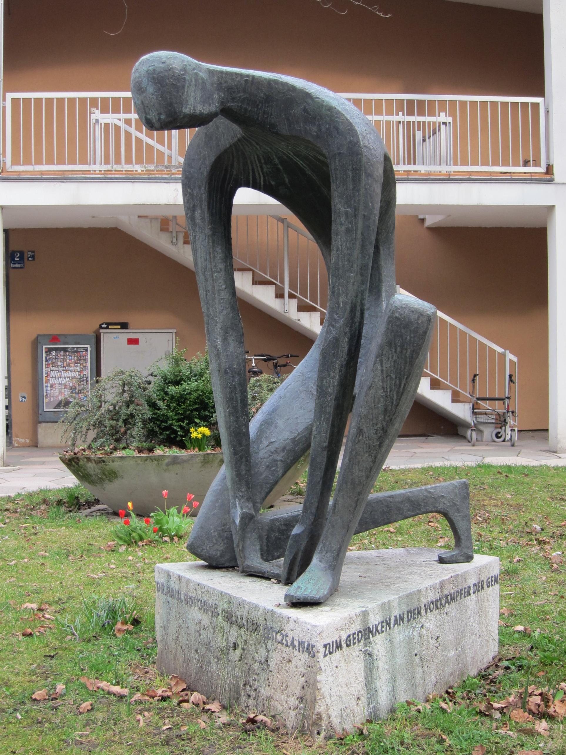 Bronzeplastik, zum Gedenken an Paul Busching (1877-1945); Parkstadt Bogenhausen in München, westlich der Ladenzeile Buschingstraße 2/4/6. Geschaffen 1958 von Seff Weidl.